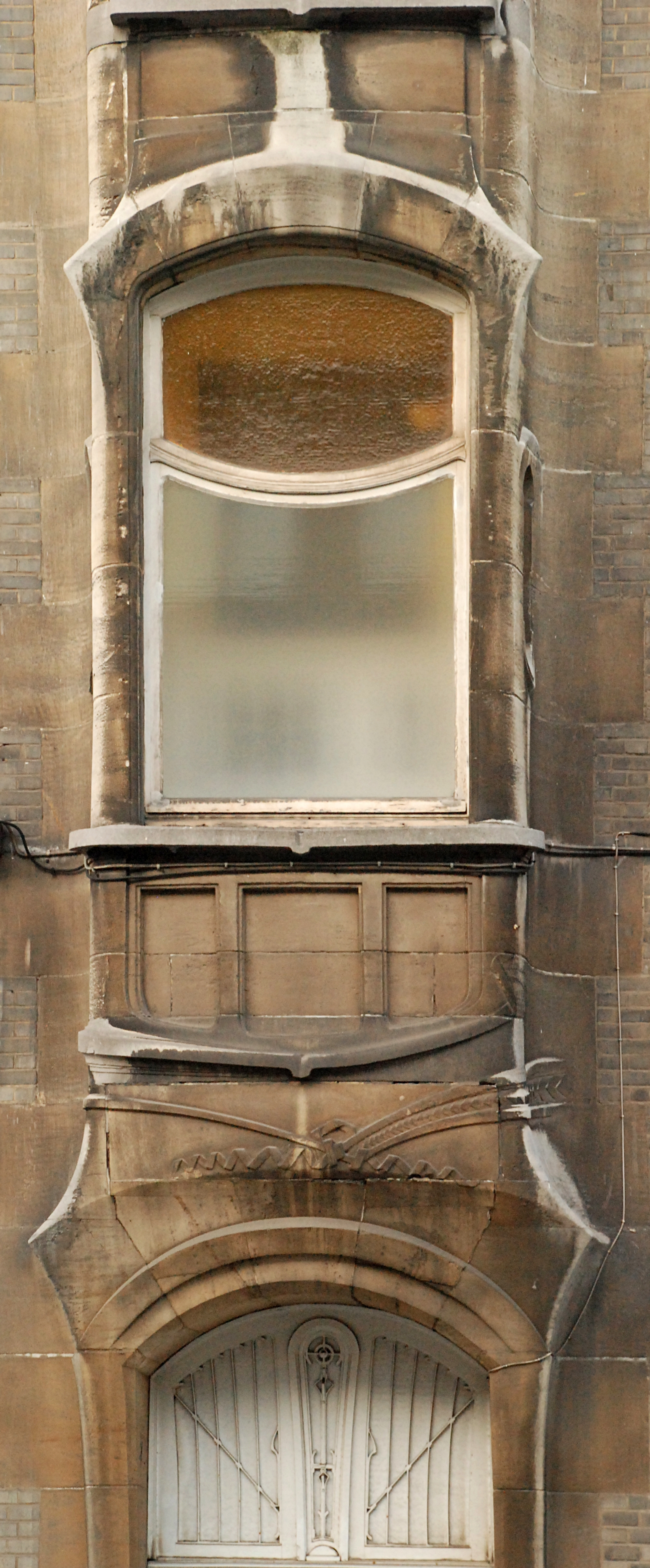 Jules Piermont - Bruxelles - Boulevard Clovis 15 (Art nouveau)